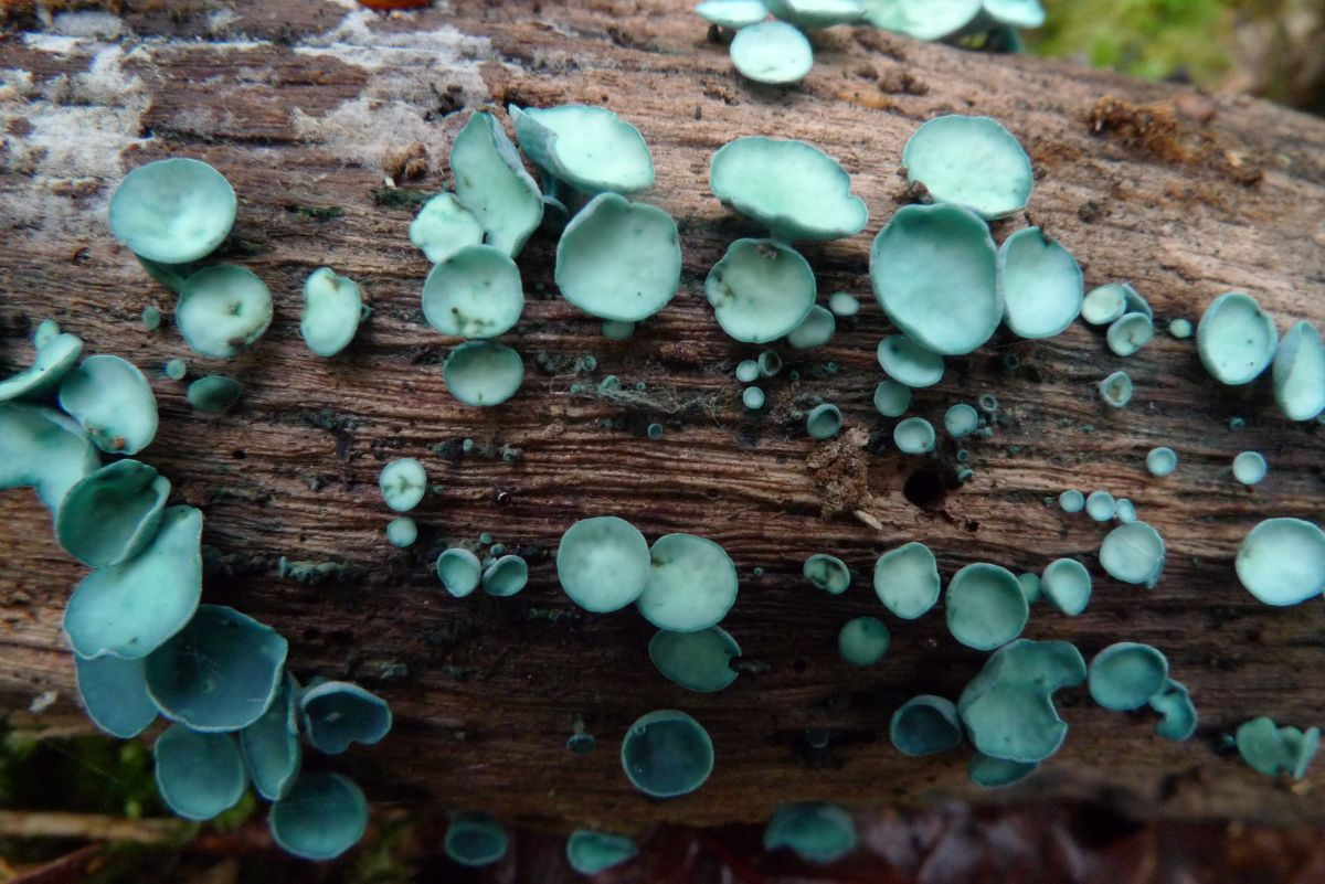 Chlorociboria aeruginosa/aeruginascens, forêt de Haute-Sève (St-Aubin-du-Cormier, Ille-et-Vilaine, Bretagne, France)